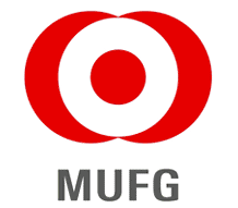 三菱UFJフィナンシャル・グループロゴマーク